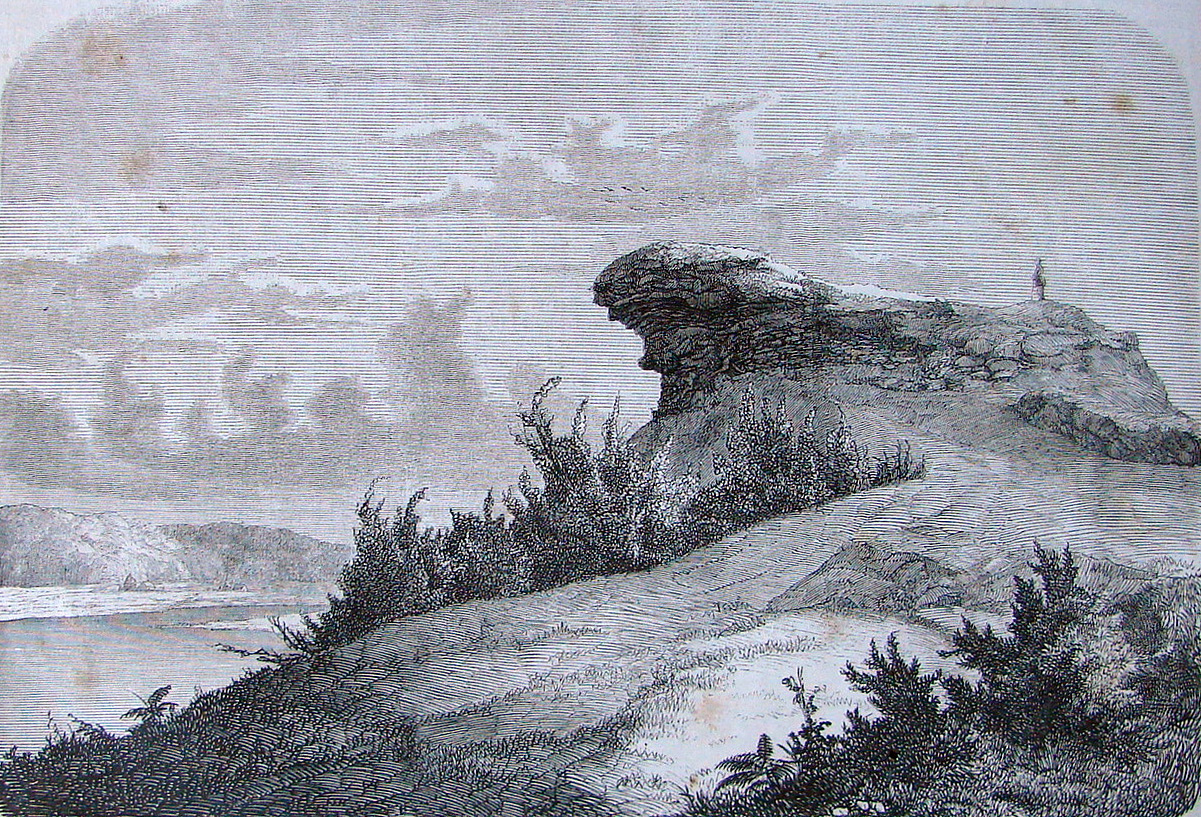 Bastruptårnet by Bastrup Sø, Seeland, Denmark